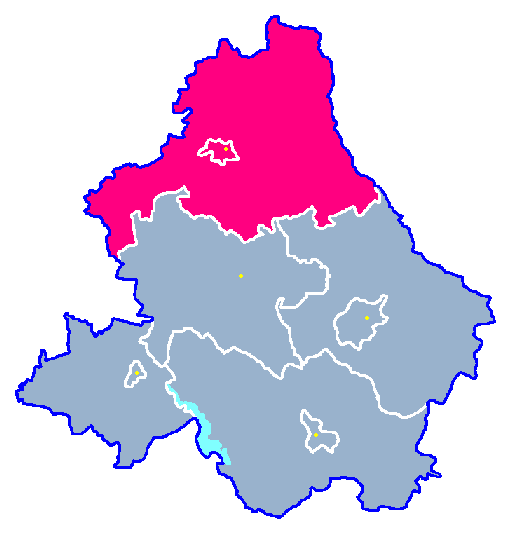 Locator maps for communes in województwo zachodniopomorskie : Resko gm.png (podział na gminy)